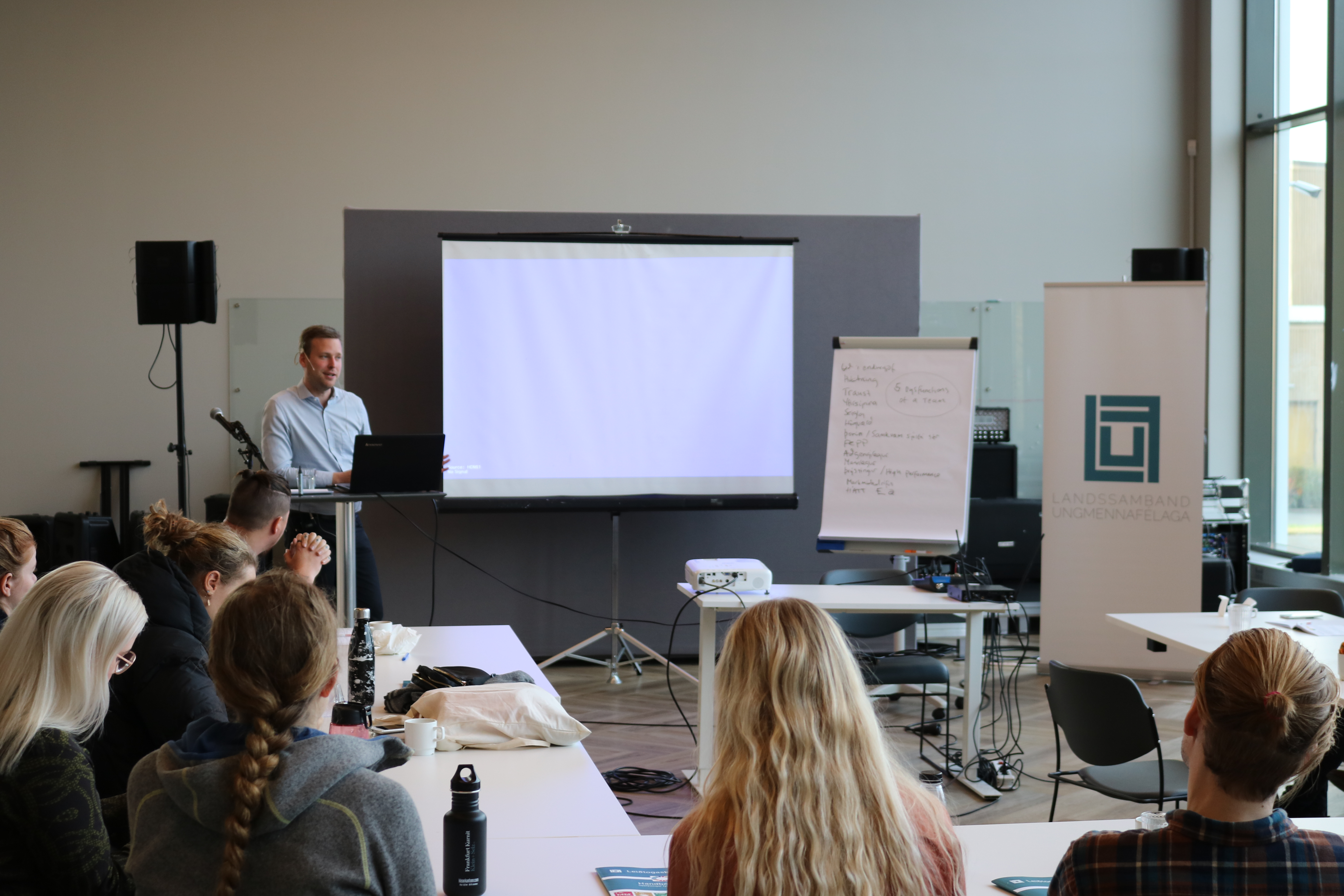 Í Leiðtogaskóla Íslands fer fram leiðtogaþjálfun á jafningjagrundvelli.